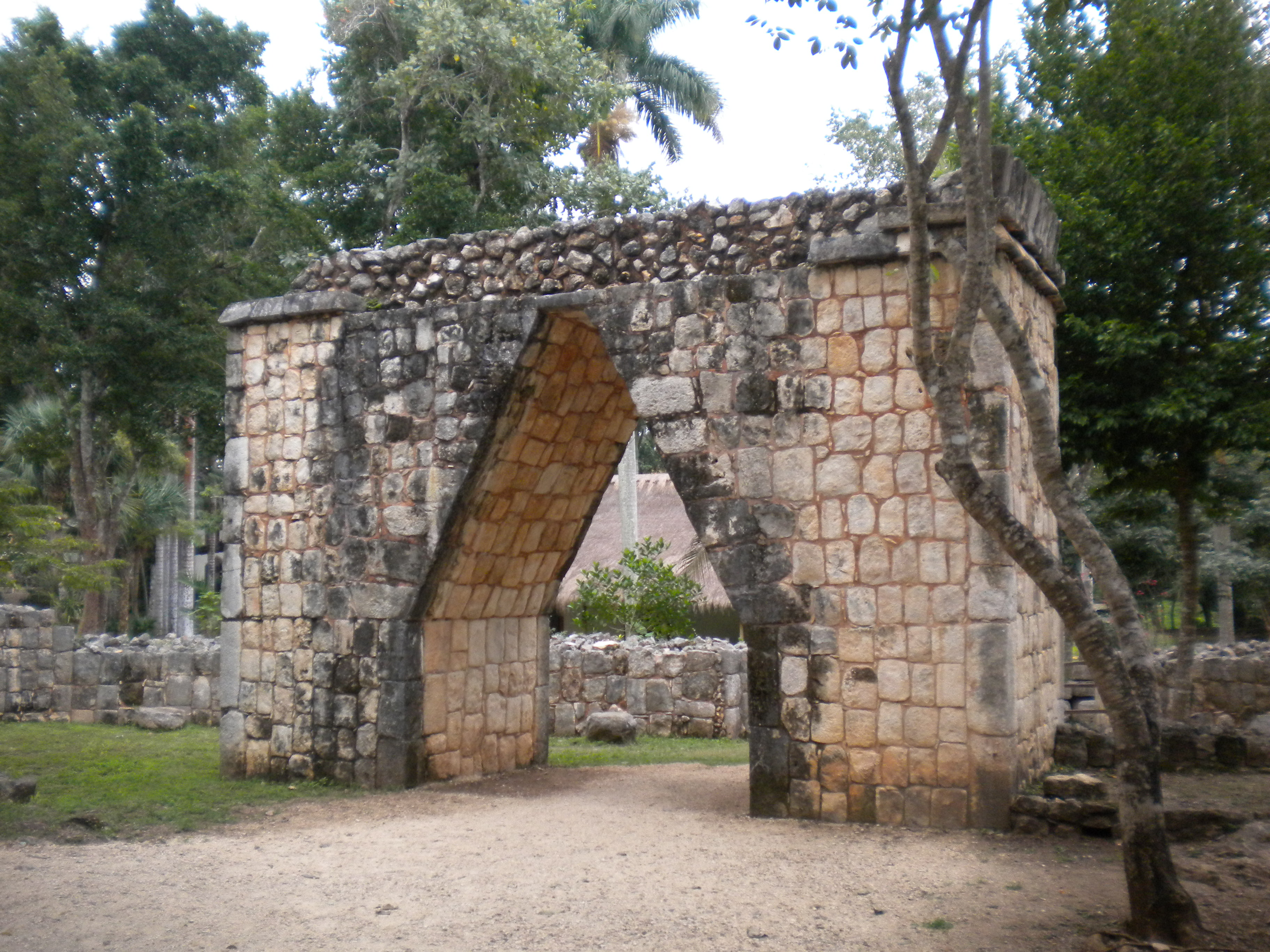 Arc primitiu no circular de la civilització maia al recinte arqueològic de Chichén Itzá.